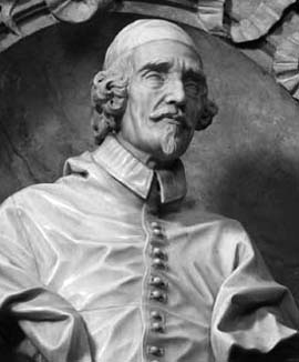 Bust del cardenal Michelangelo Ricci (1619-1682) que es conserva a l'església convent de Sant Pasquale a Roma per Domenico Guidi.